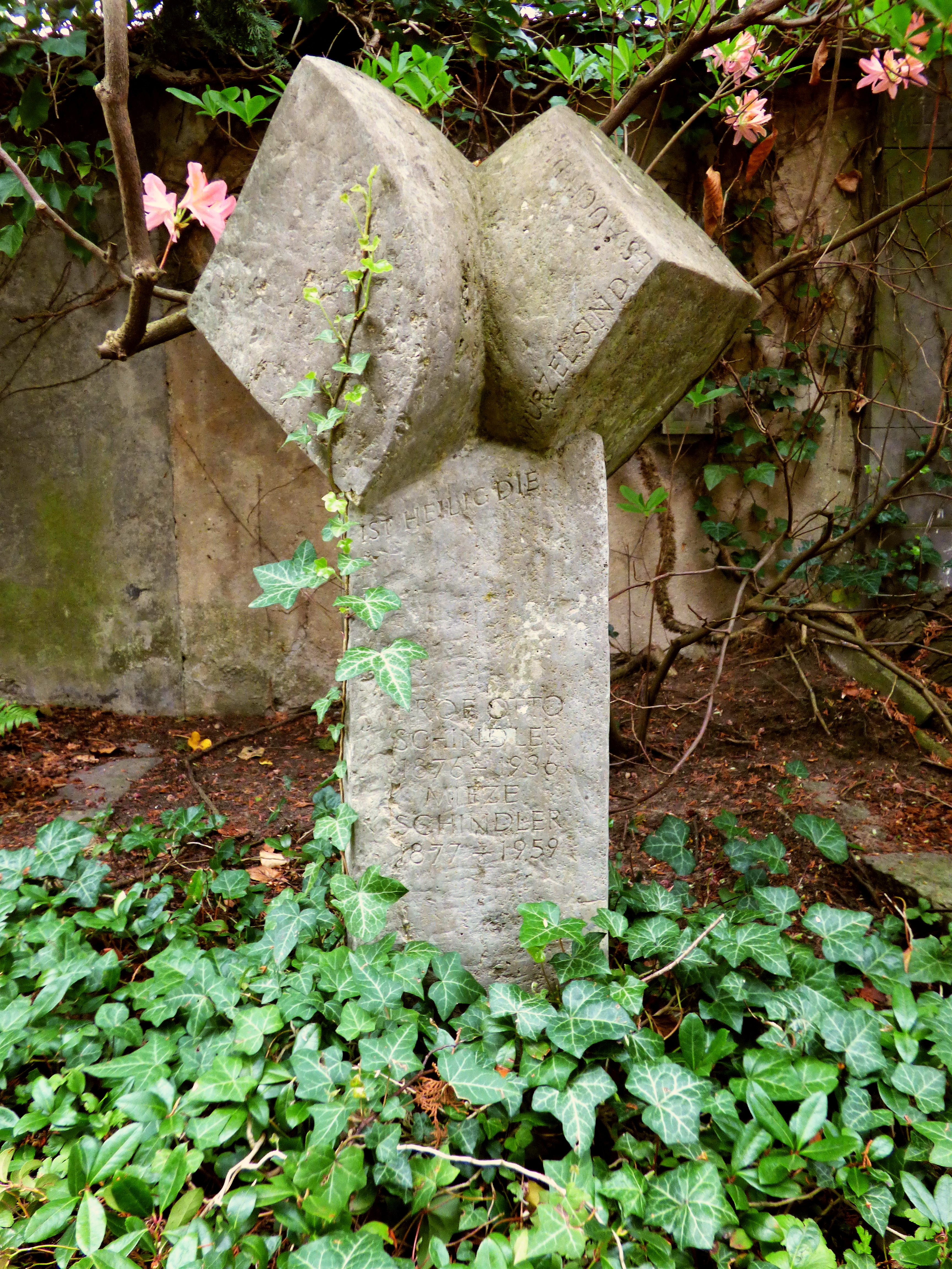 Grabmal des Gartenbaulehrers Otto Schindler (1871-1936) und seiner Frau Mieze Schindler (1877-1959), Namensgeberin der Erdbeerpflanze Mieze Schindler, auf dem Friedhof in Hosterwitz.